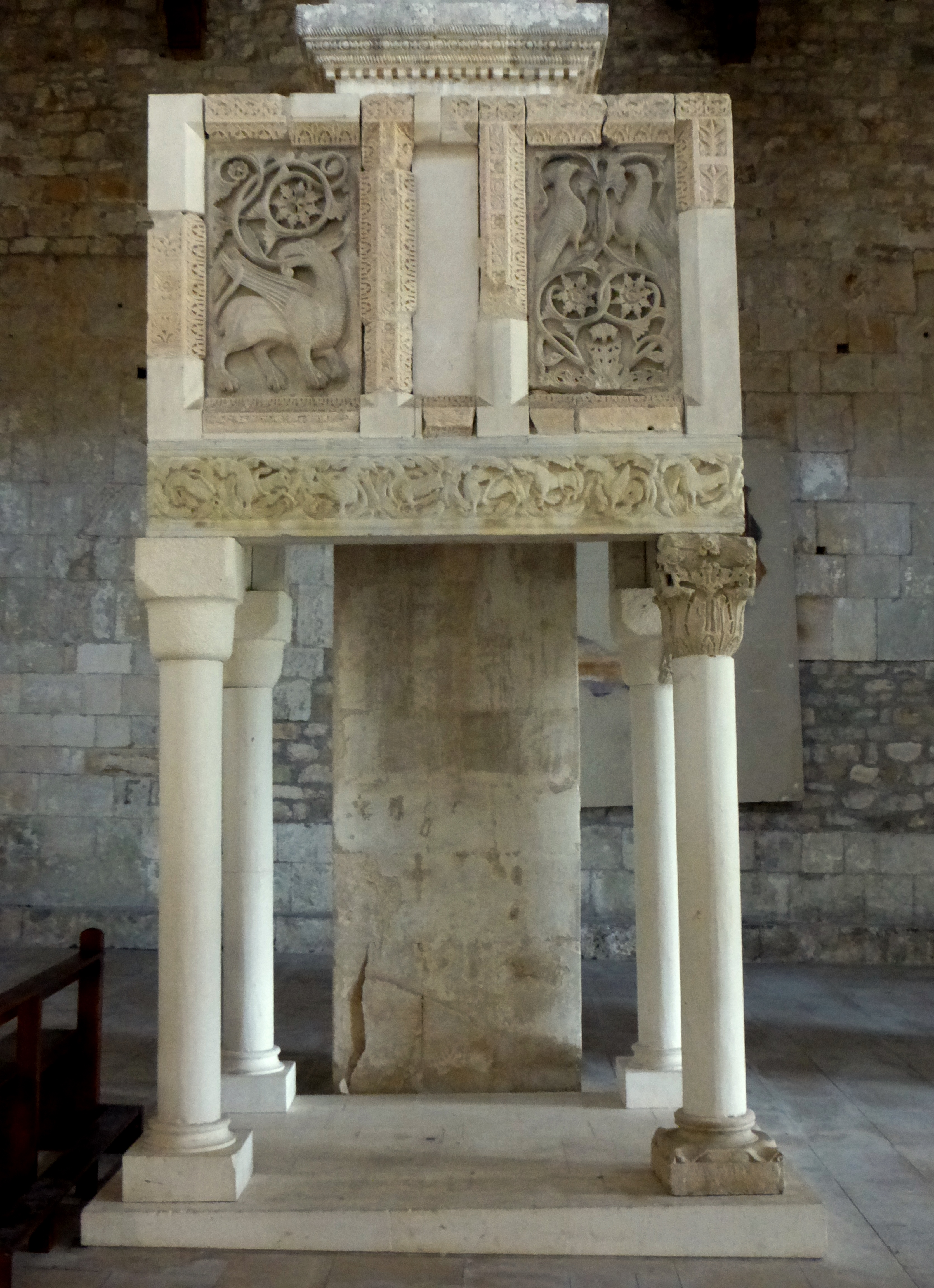 Ambone di San Liberatore a Majella, Serramonacesca, Pescara.